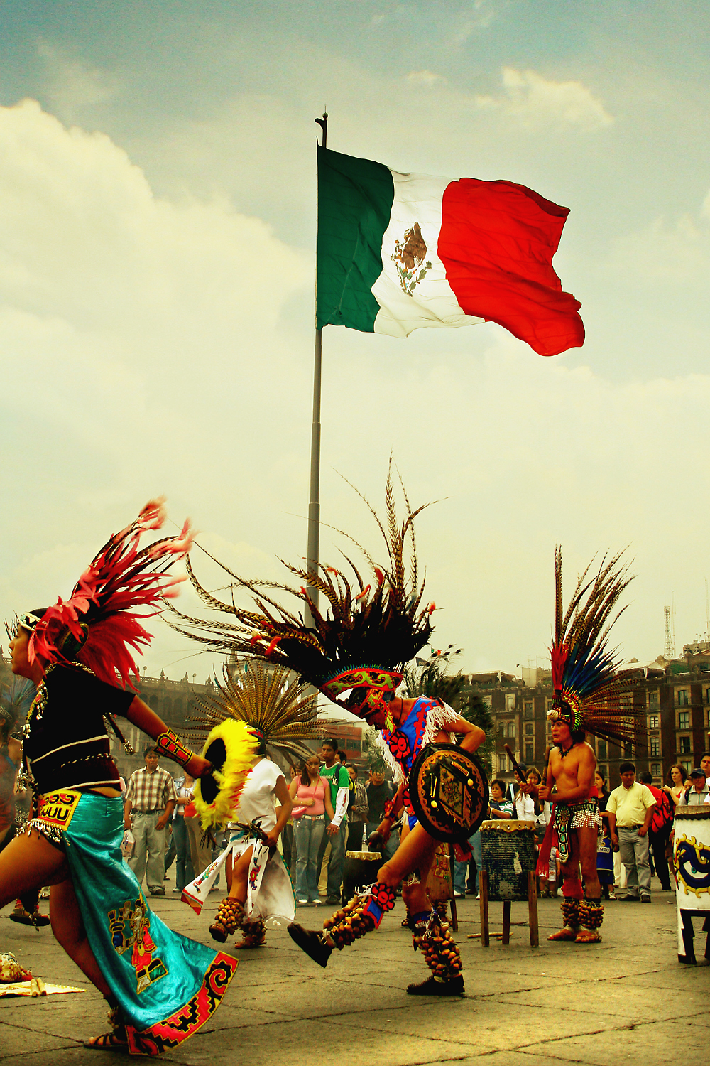 Indigenous dancers in the Plaza de la Constitución (El Zócalo) in Mexico City